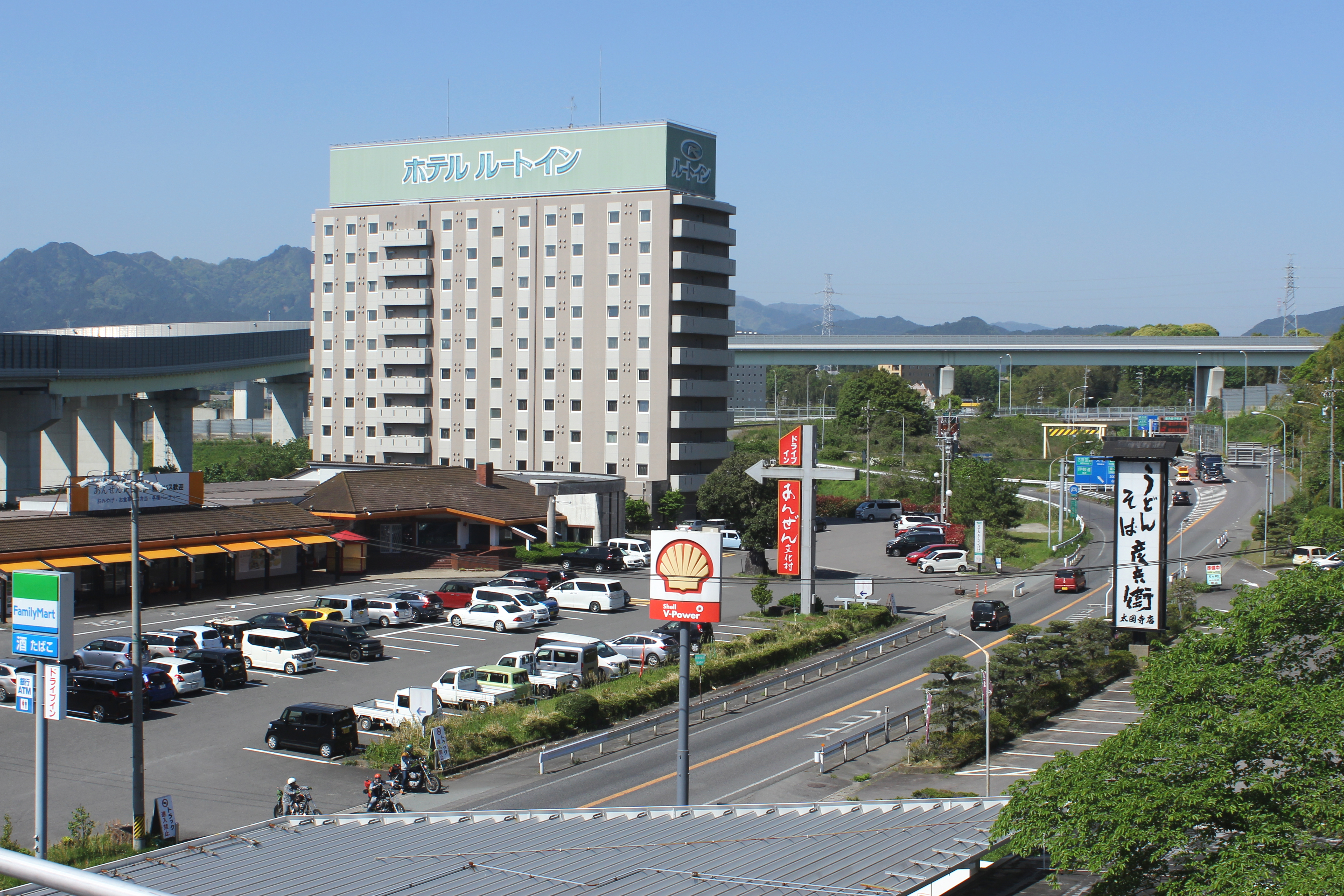 亀山インターチェンジを国道1号四日市方面側から望む